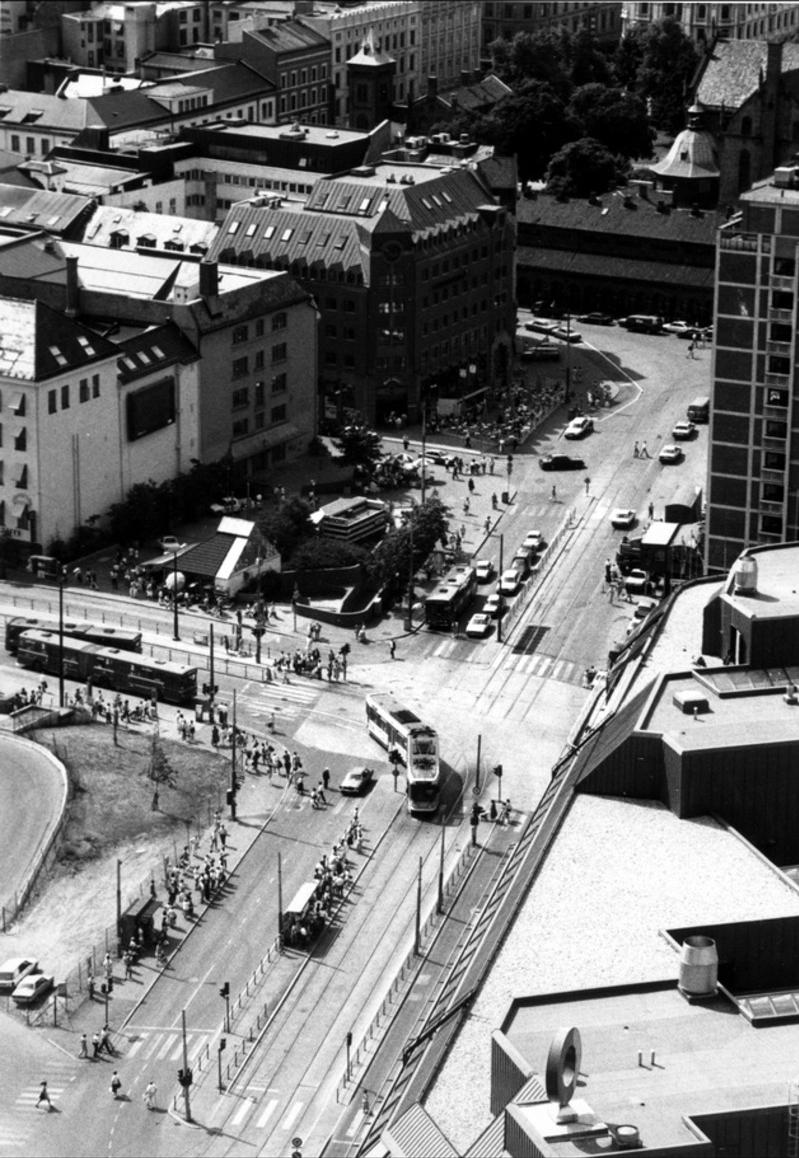 Biskop Gunnerus' gate, antakelig fotografert fra Hotel Plaza ca 1985